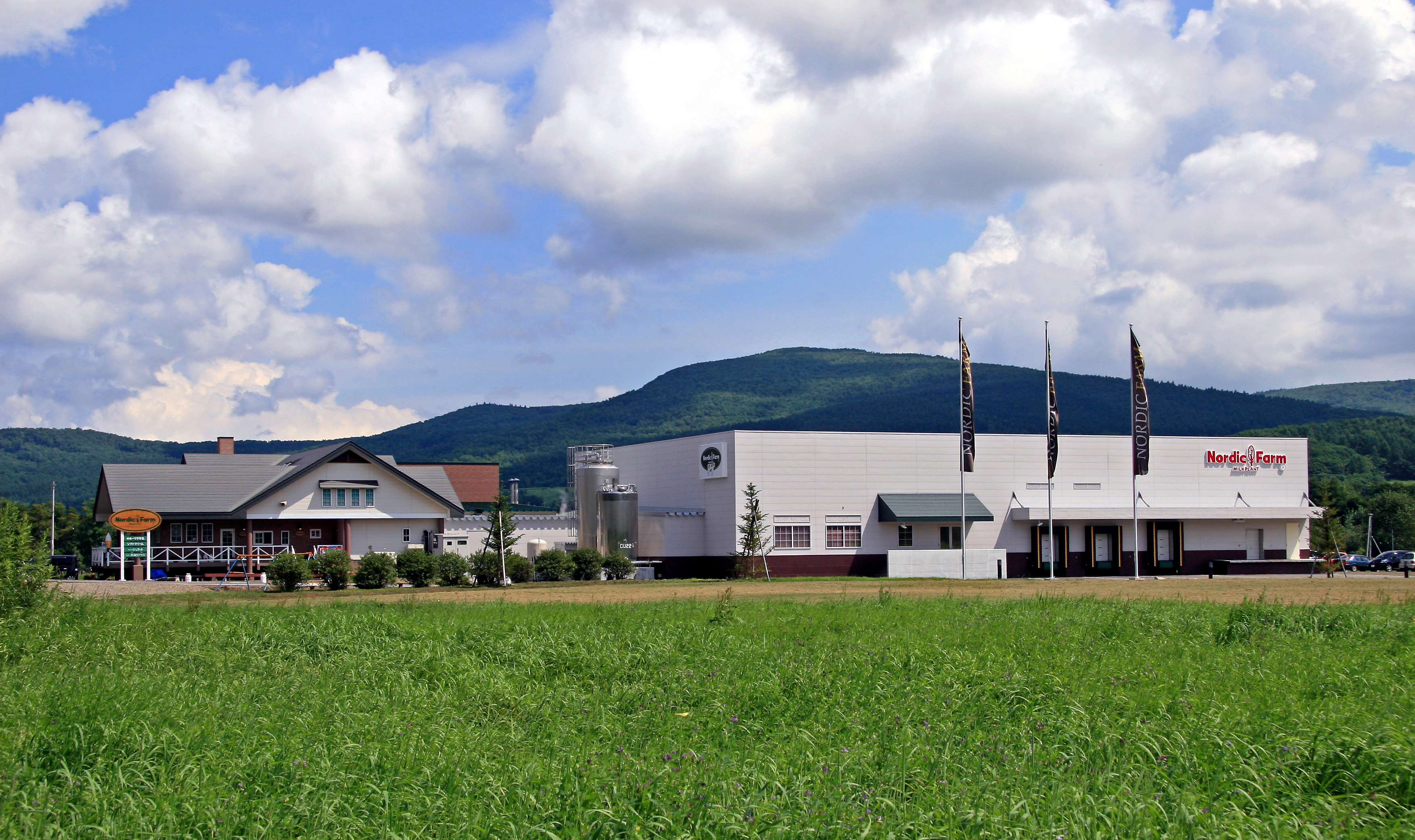 合同会社 西原牧場 ノルディックファーム酪農工場